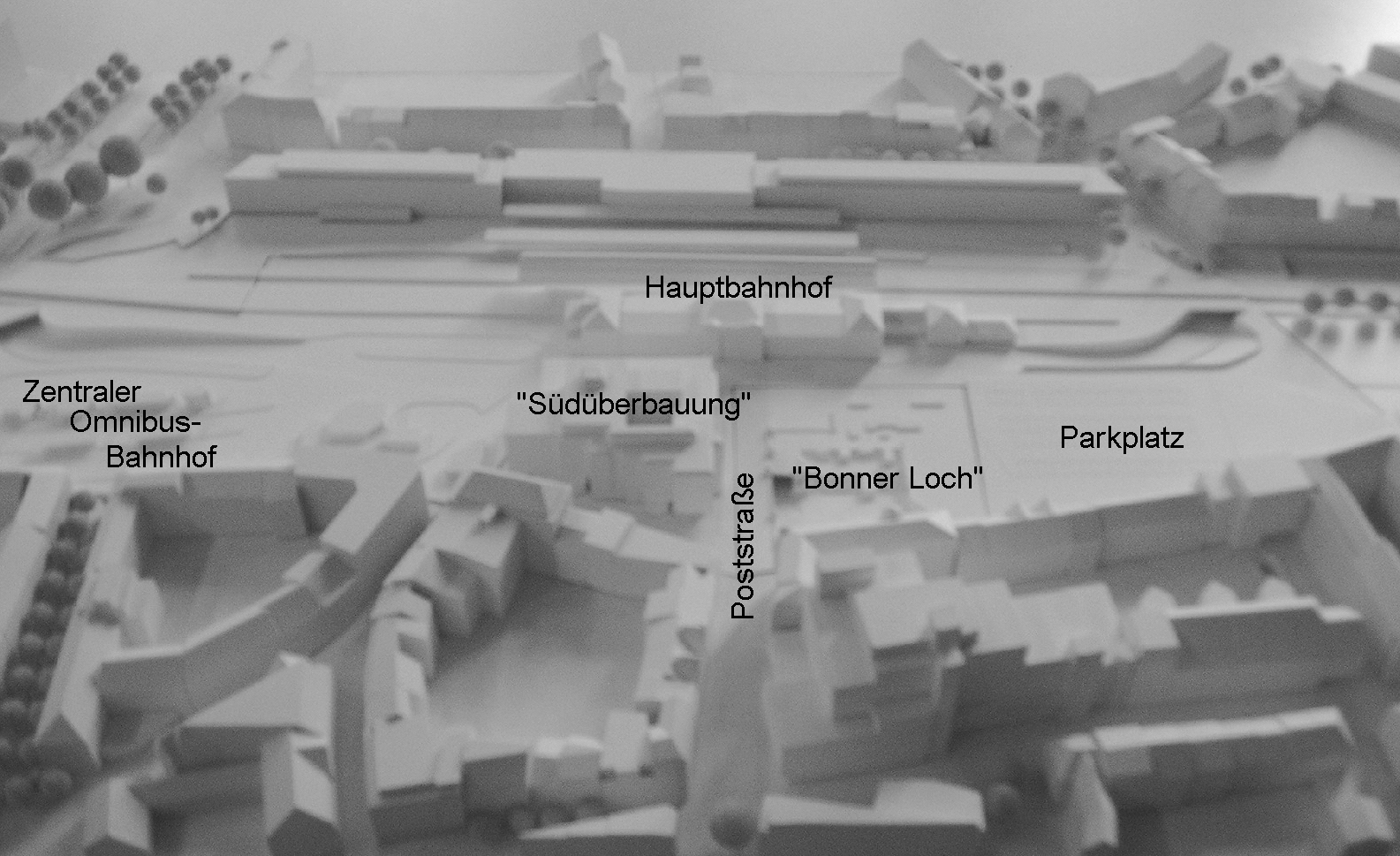 Modell des Bahnhofbereiches in Bonn